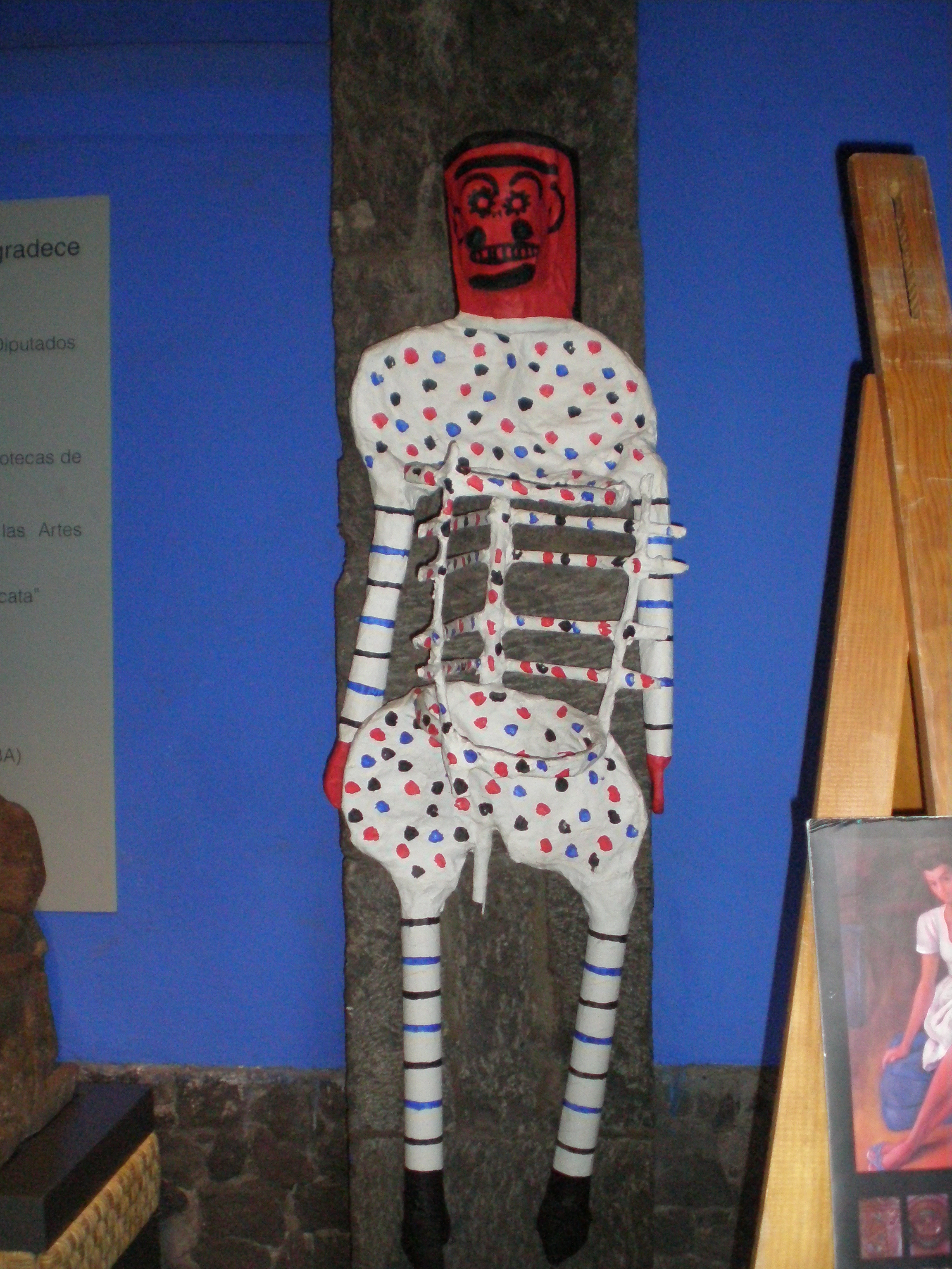 Museo Frida Kahlo (Casa Azul) en la Ciudad de México (Distrito Federal), México.